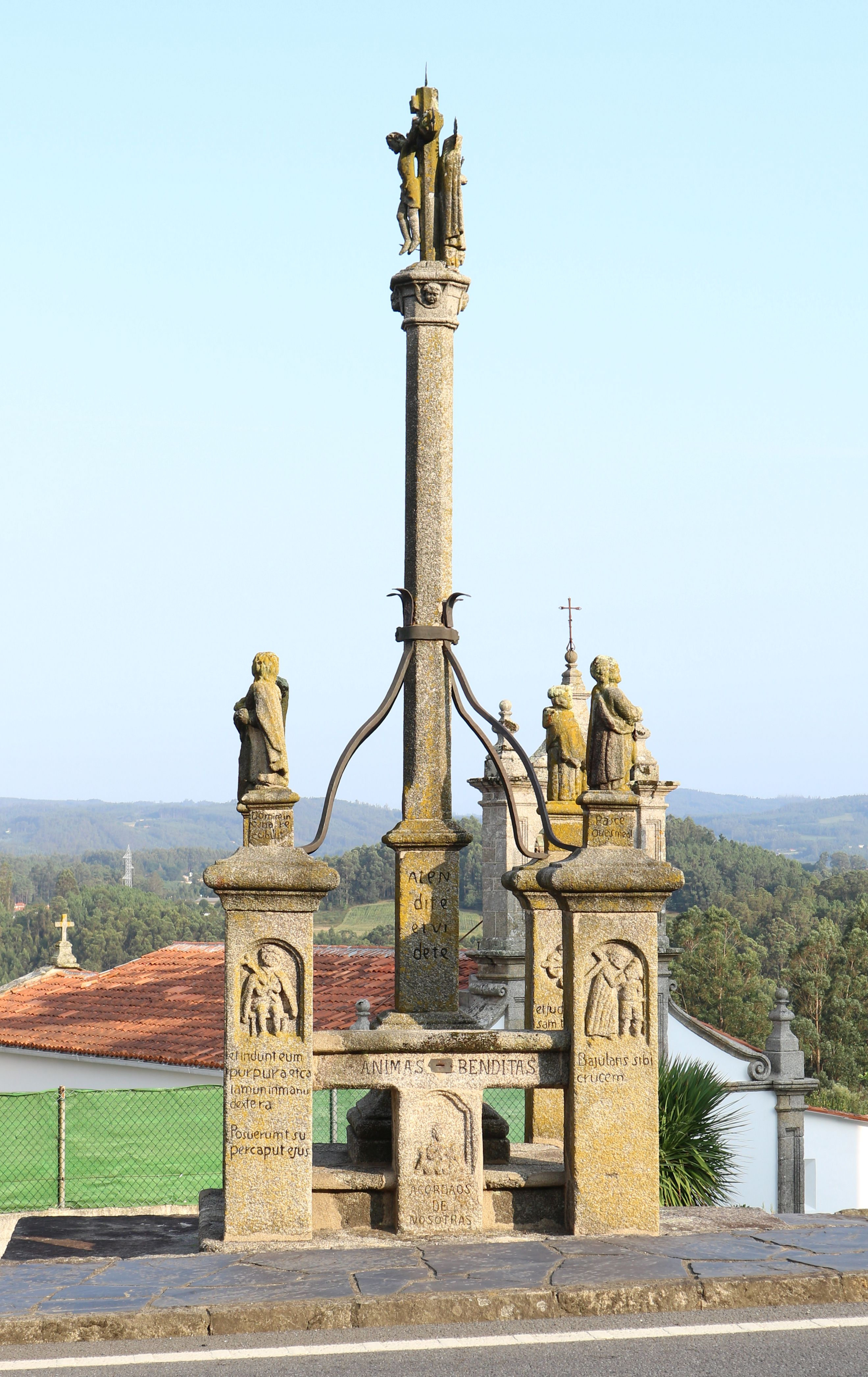 Cruceiro bonito no Adro, en Abegondo, Abegondo.